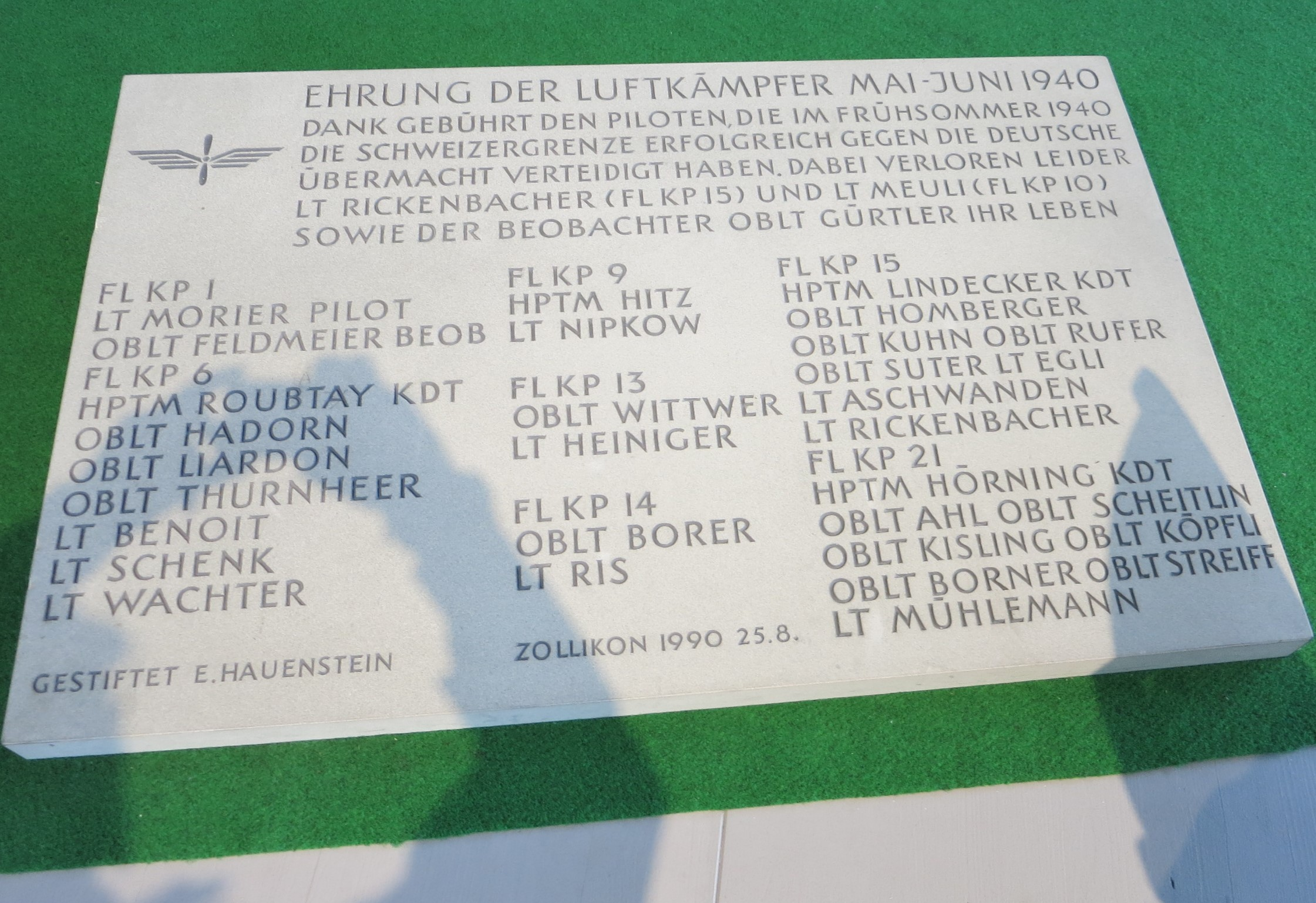 Flieger-Flab-Museum, Dübendorf ZH, Schweiz